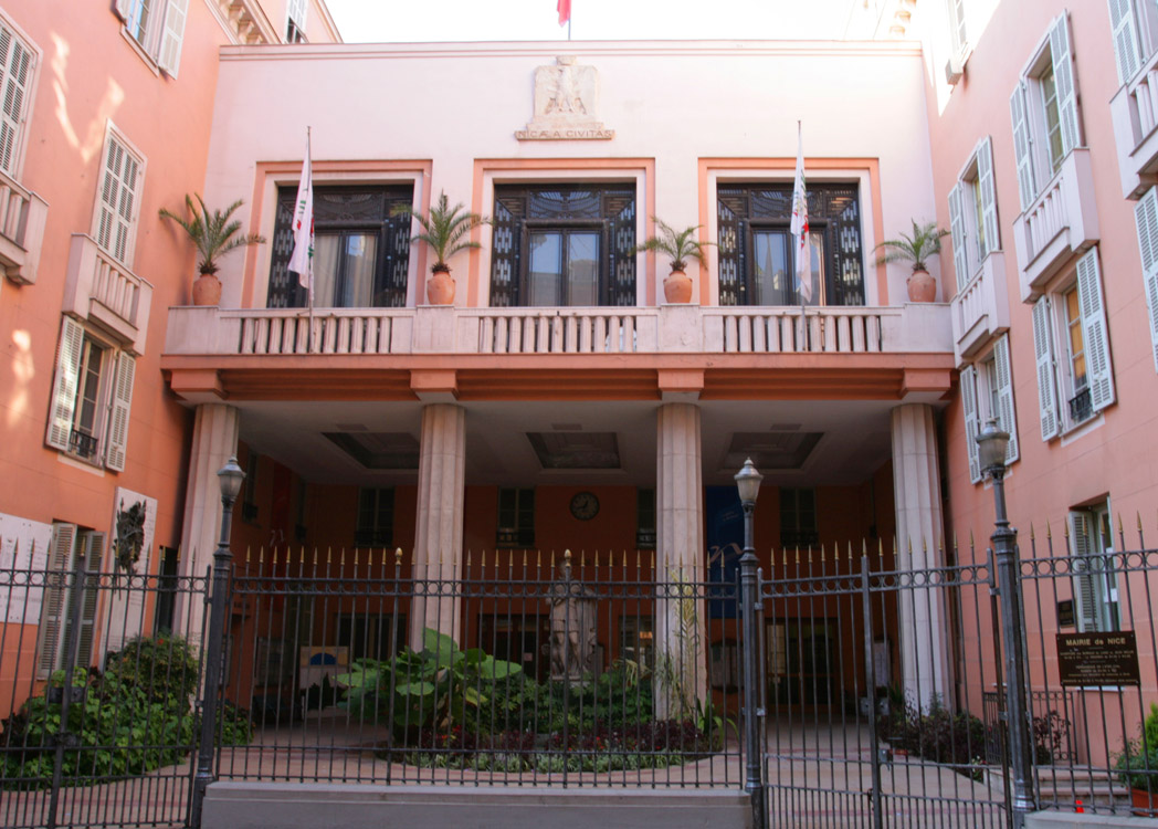 La façade de l'Hôtel de ville de Nice